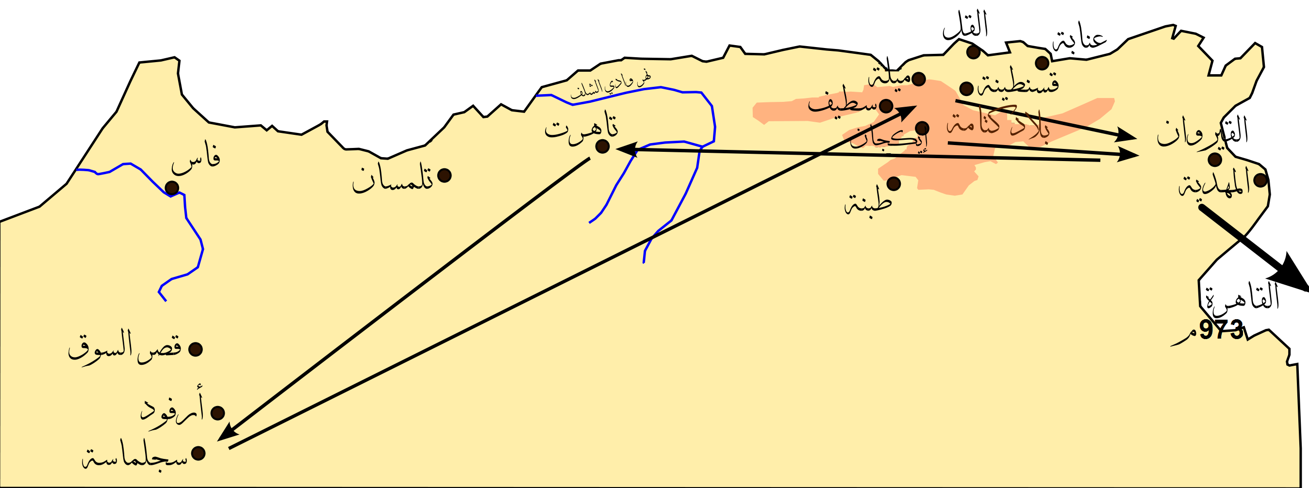 الحِراك والتوسُّع الفاطميّ في المغرب بين سنتيّ 909 و973م